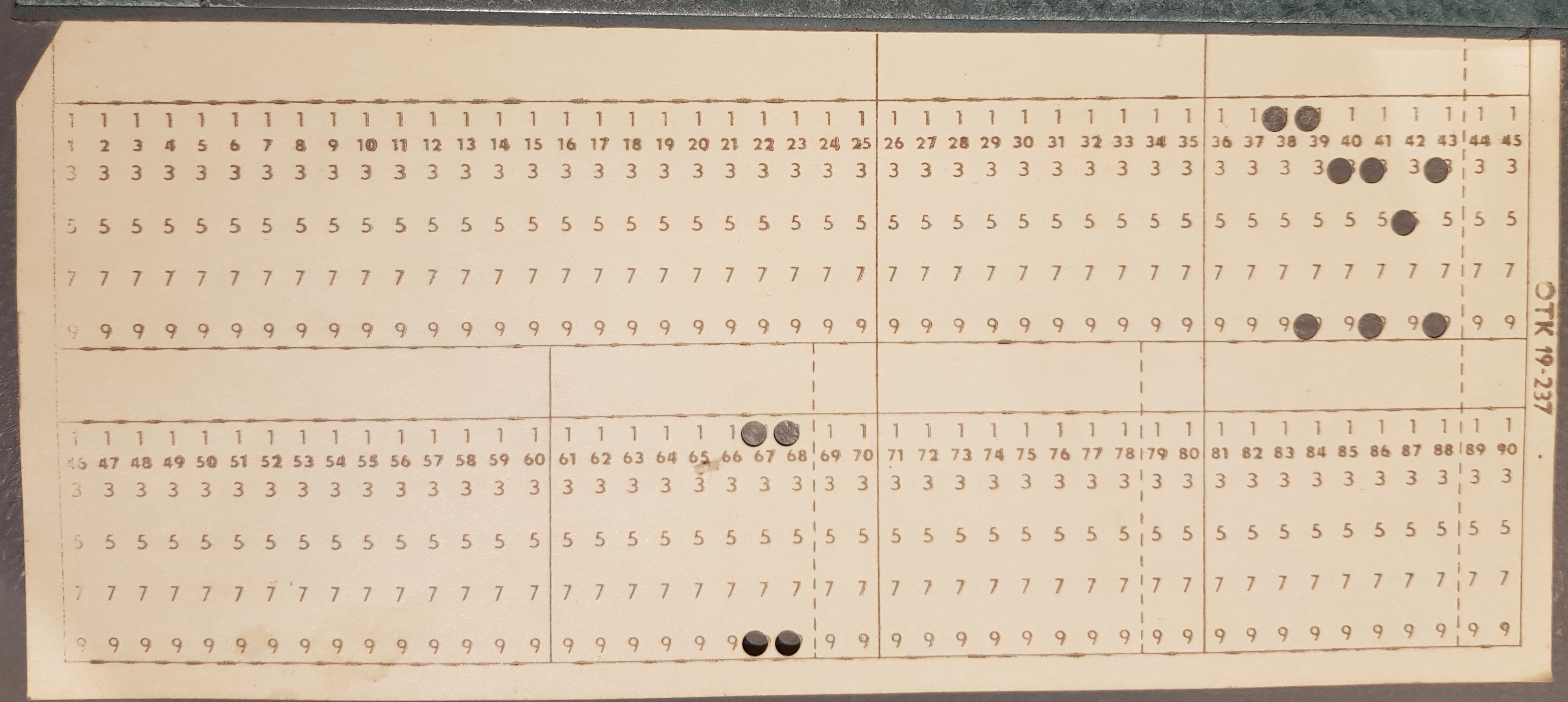 děrný štítek užívaný v 70 letech 20.století vyvinutý VÚMS (Výzkumným ústavem matematických strojů) v Praze, specifická cesta českého vývoje výpočetní techniky.